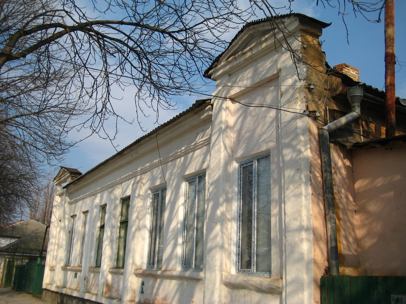 Бывший дом братьев Янишевских